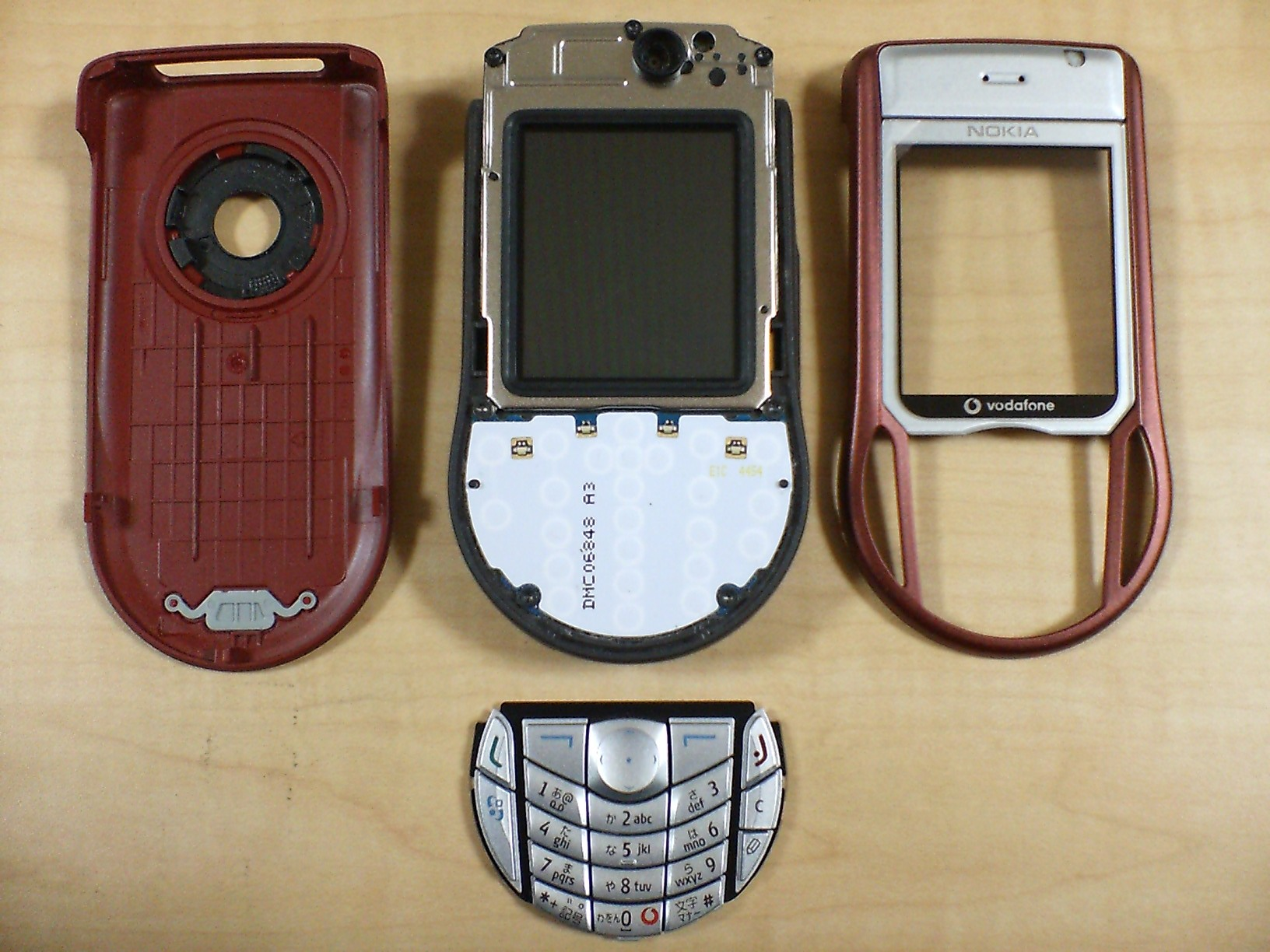 Vodafone 702NK (Nokia 6630) mobile phone